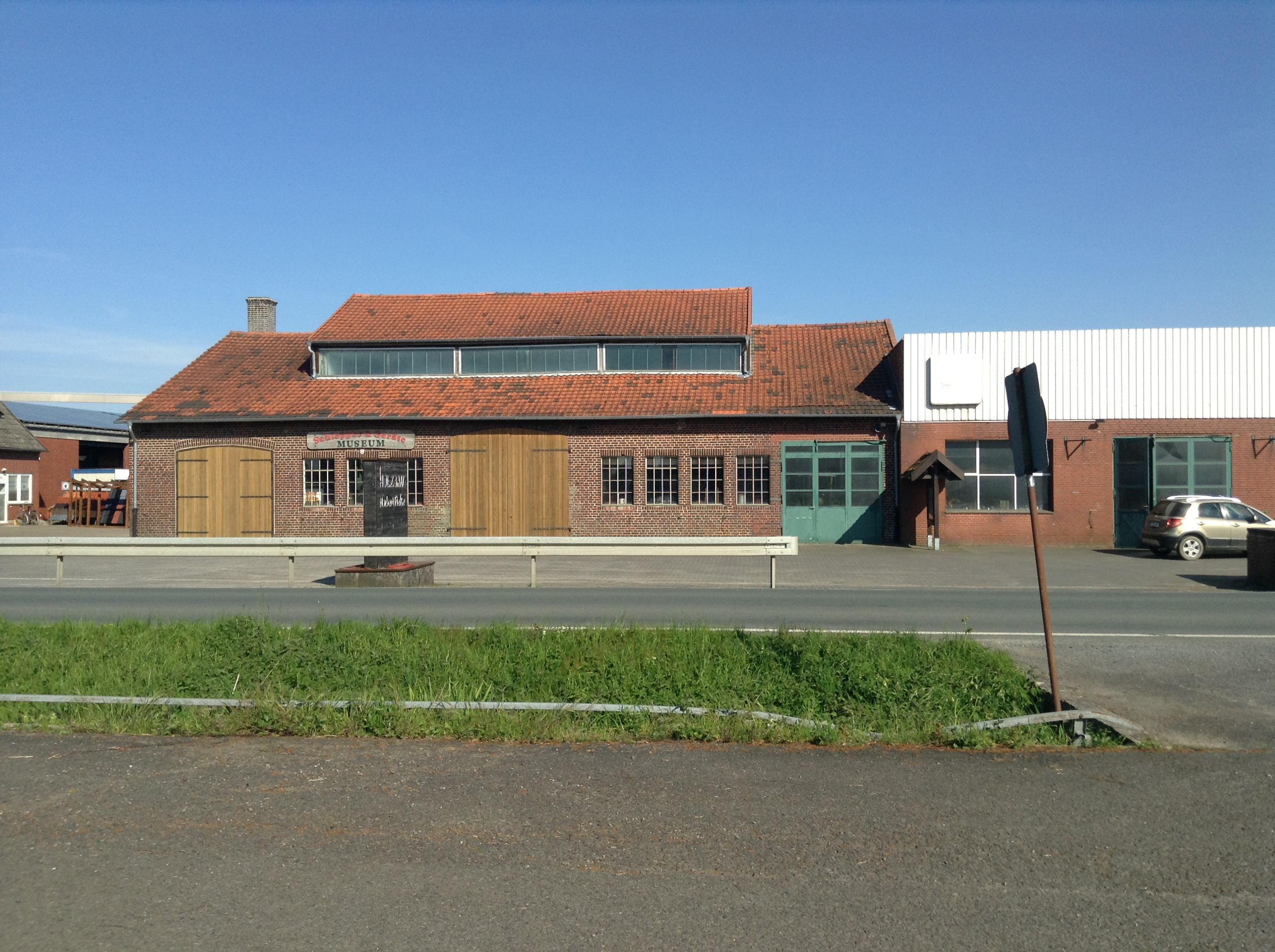 Ehemaliges Fabrikgelände Wesselers